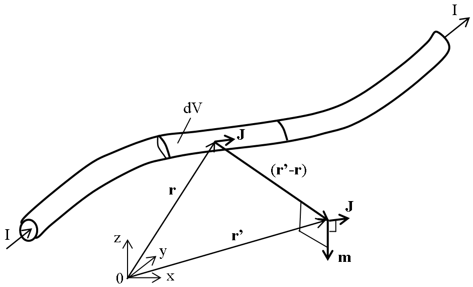 Илюстрация поясняваща изчисляването на магнитния момент на произволно токово разпределение; © 2007 Милко Куйлеков